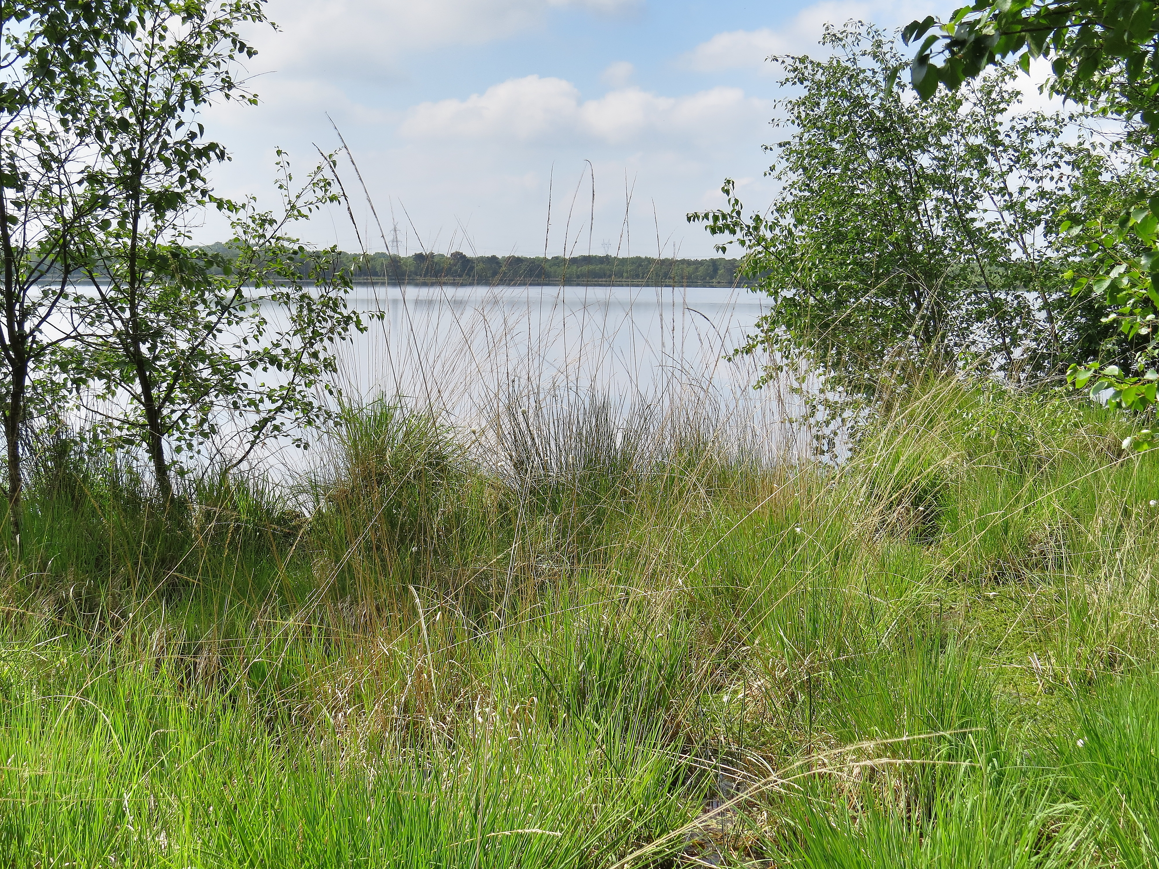 Südufer (Hintergrund) des Bülter Sees im NSG Bülter See und Randmoore, von Norden aus gesehen